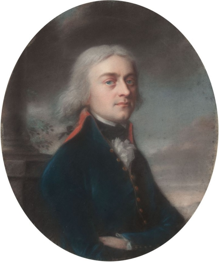 Ludwig Friedrich II, Prince of Schwarzburg-Rudolstadt (1767-1807)